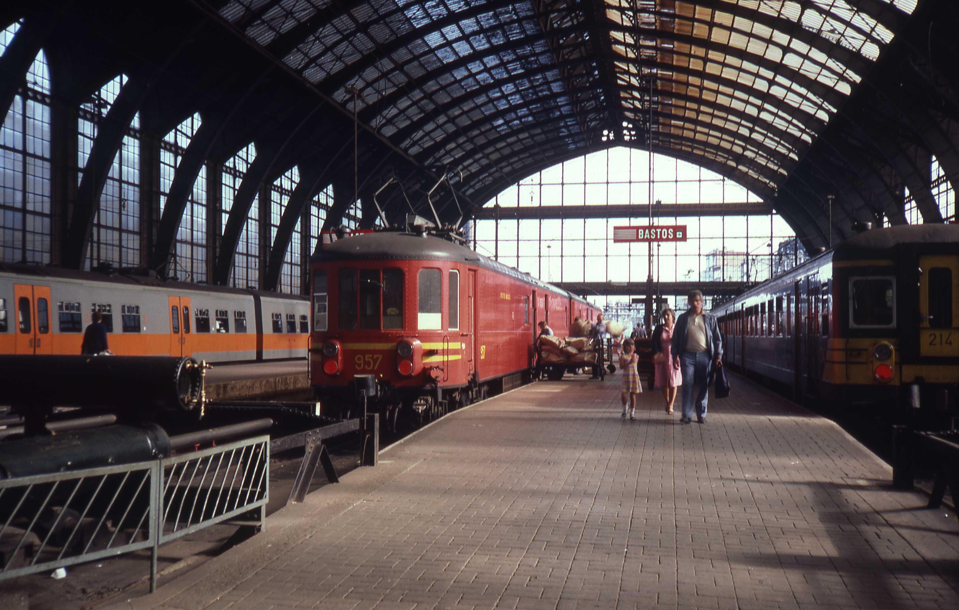 Posttrein in Antwerpen centraal